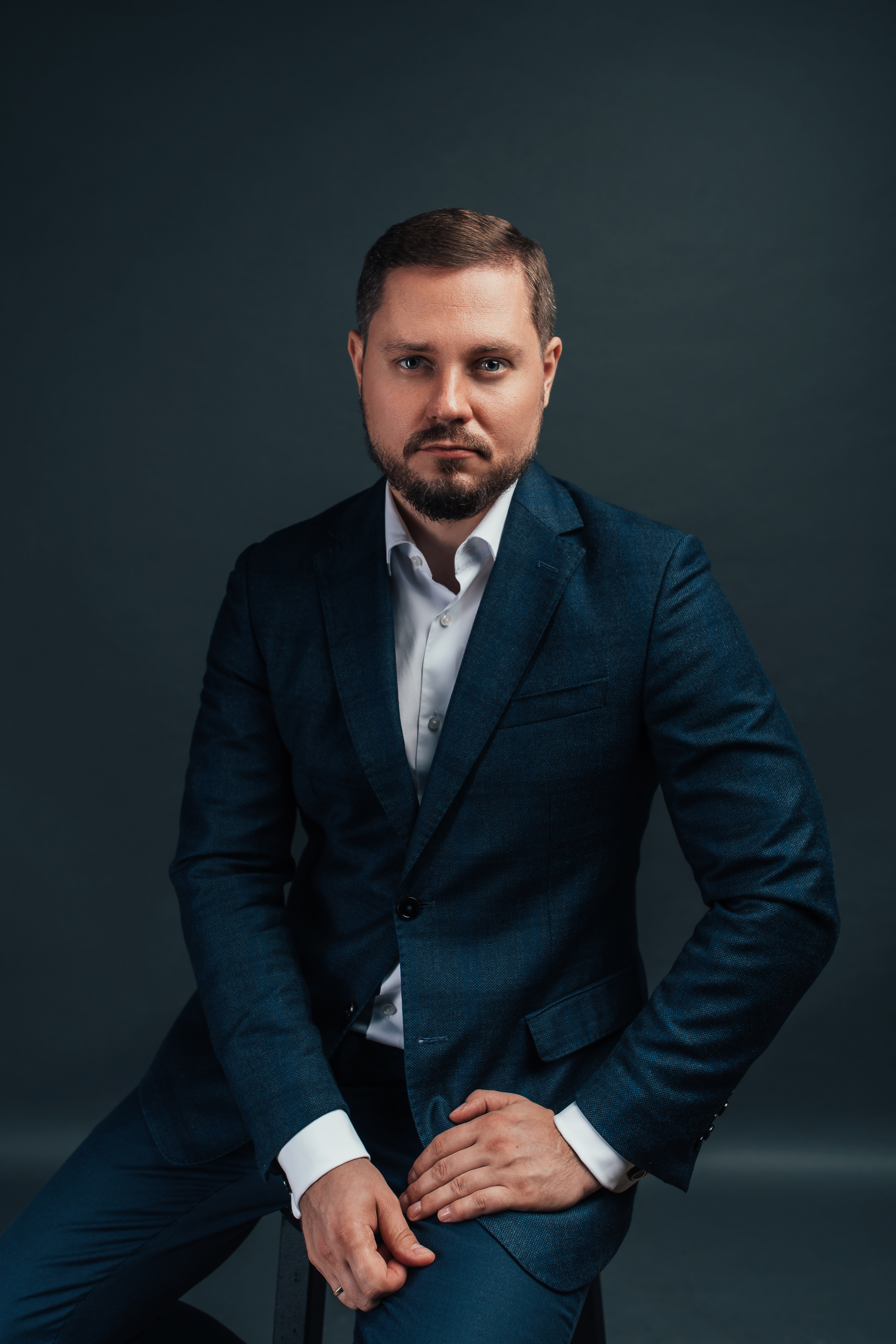 Офіційне фото